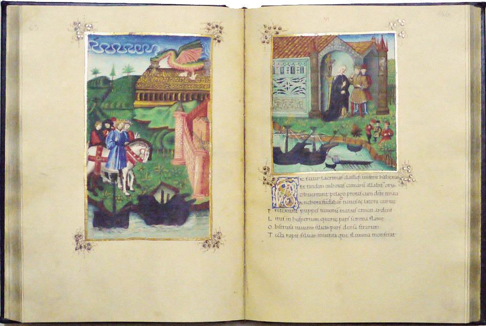 Bucólicas Geórgicas y Eneida de Virgilio. Facsímil del códice ms. 837 de la Universitat de València, editado por Vicent García Editores.